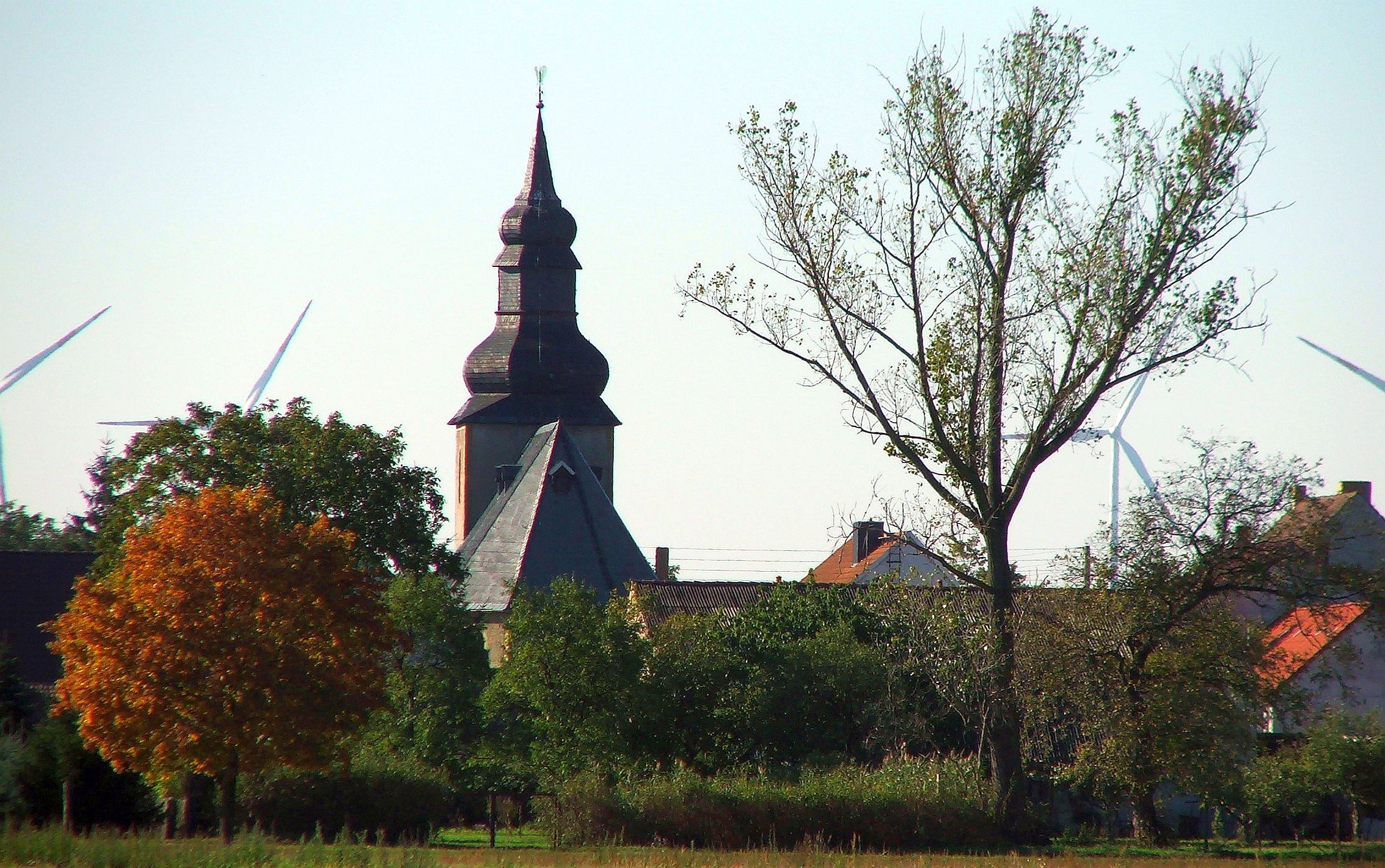 Oschätzchen